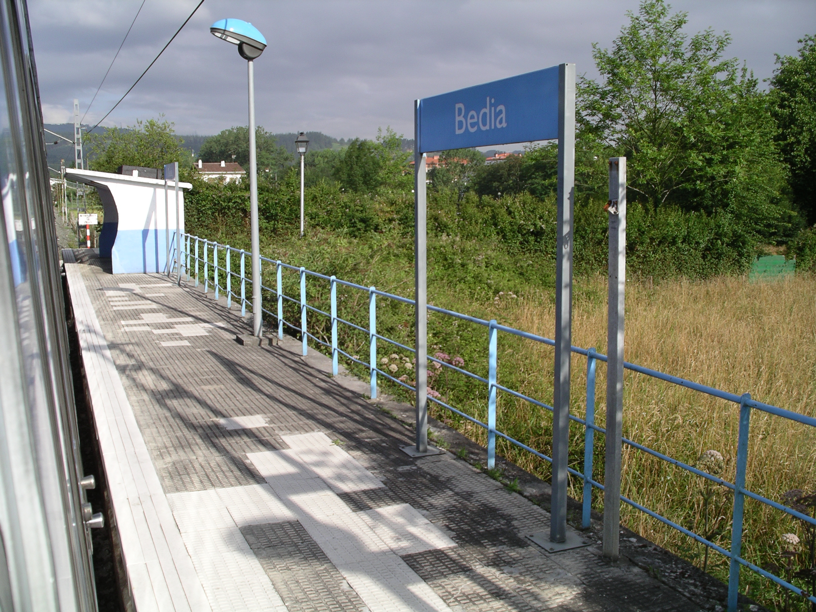 Bedia udalerriko lurgaineko tren geralekua. Bedia, Arratia (Bizkaia).